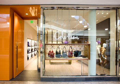 Cole Haan WestFarms